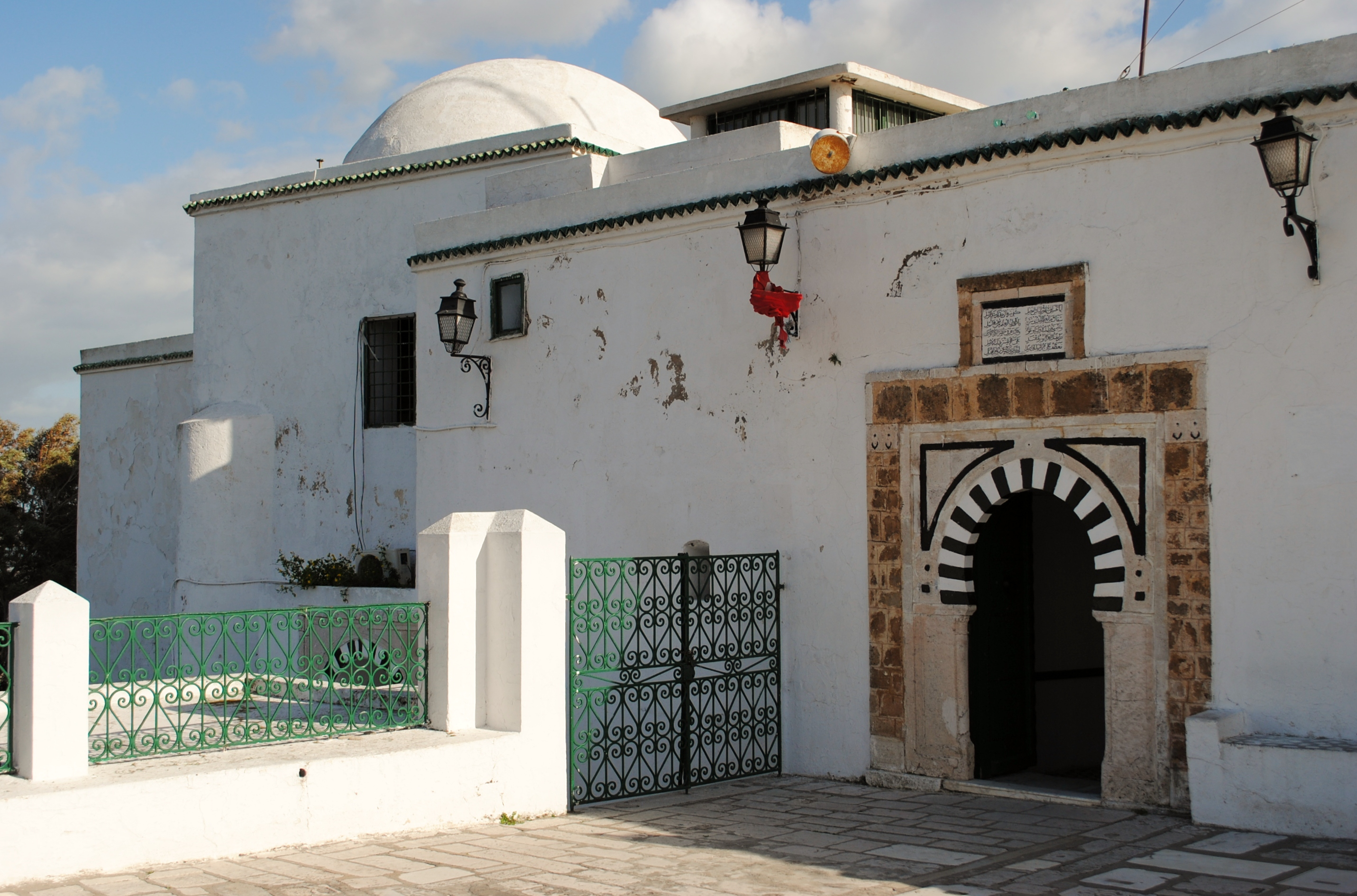 Entrée du mausolée de Sidi Belhassen à Tunis